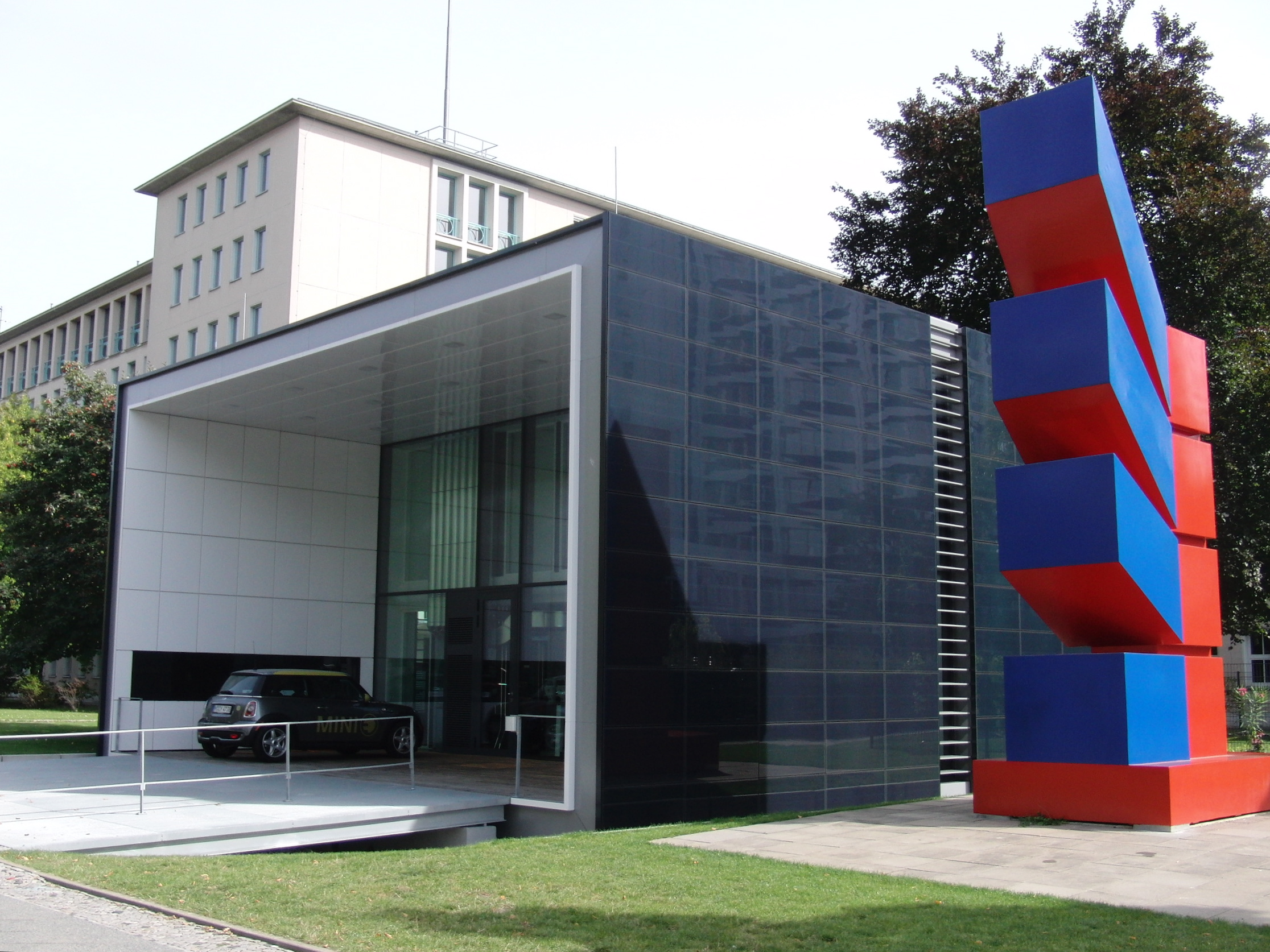 Das Effizienshaus Plus daneben eine Plastik von O.H.Hajek von 1971, Fasanenstr. 87, Berlin